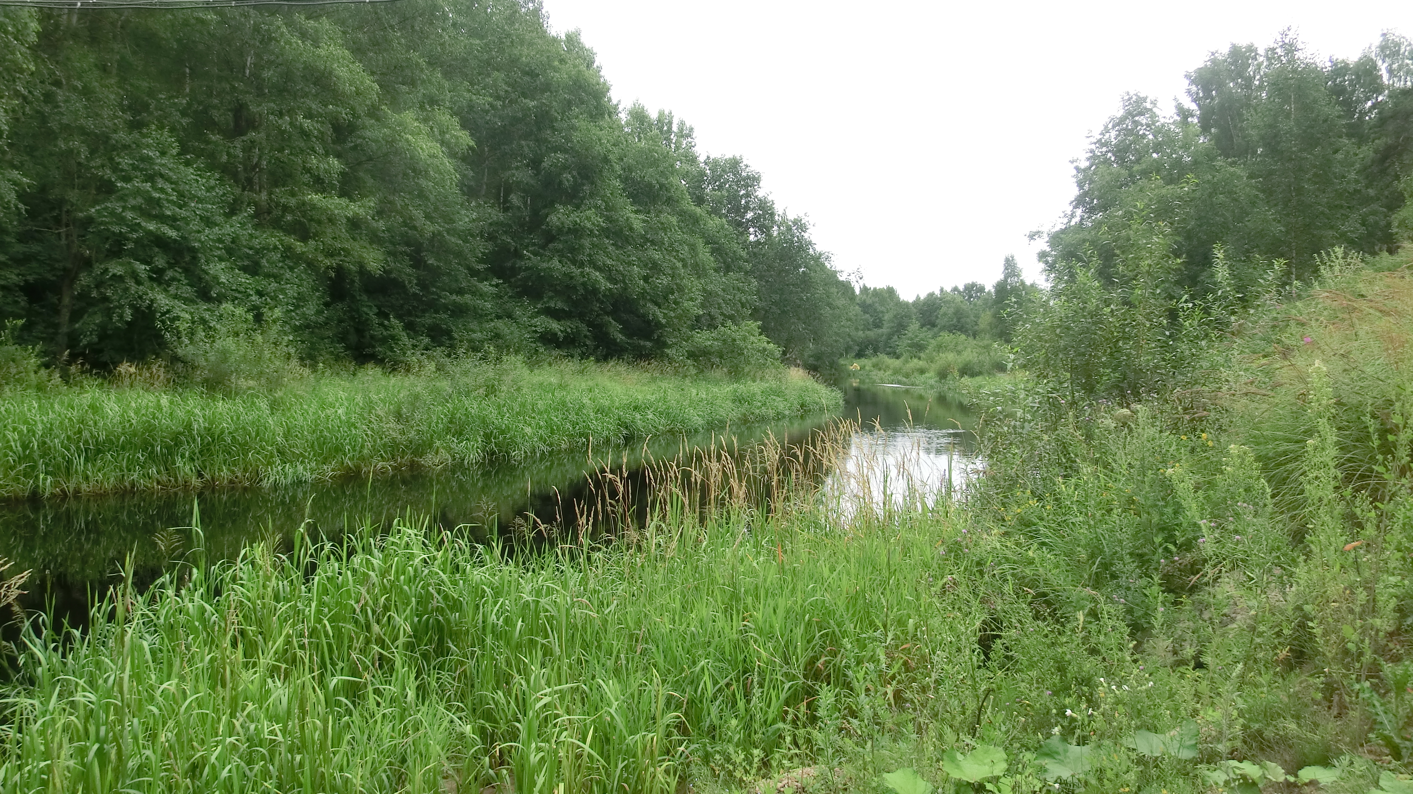 Вид на реку Назию рядом с трассой Р-21 «Кола». Ленинградская область.